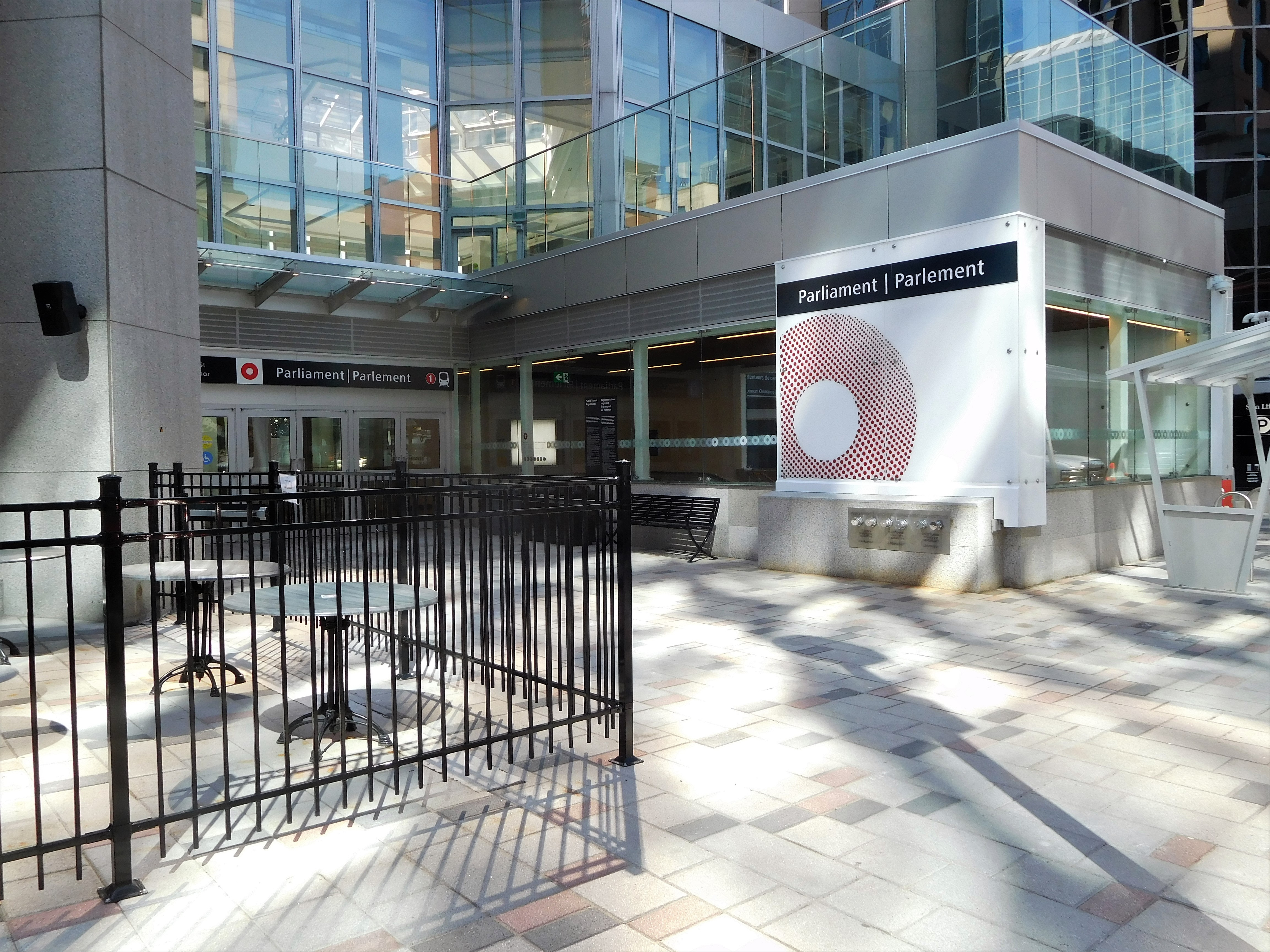 Entrée de la station Parlement sur la rue Queen à Ottawa